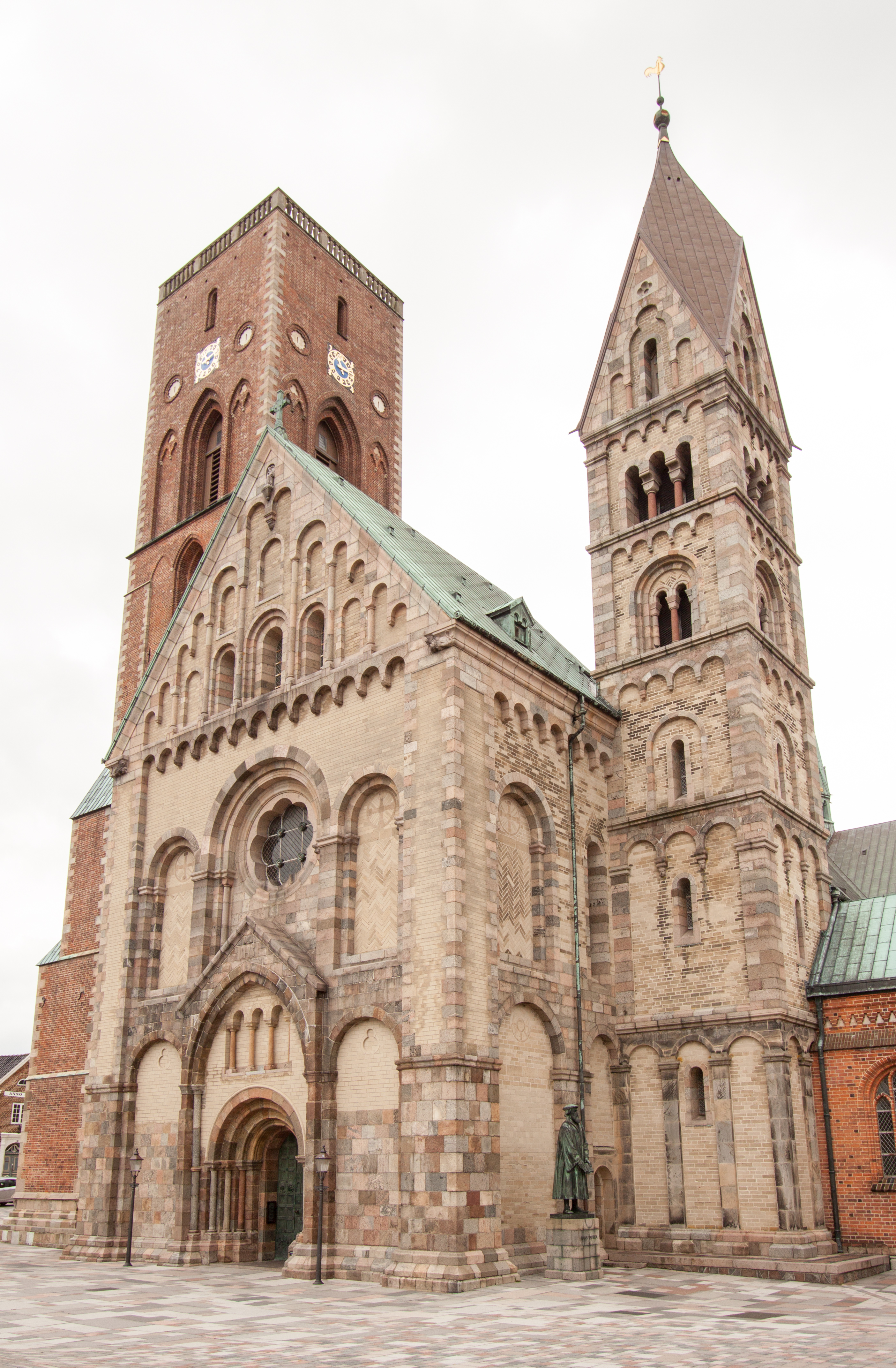 Ribe Domkirke exteriorlabel QS:Len,"Ribe Domkirke exterior" label QS:Lhu,"A ribei dóm"